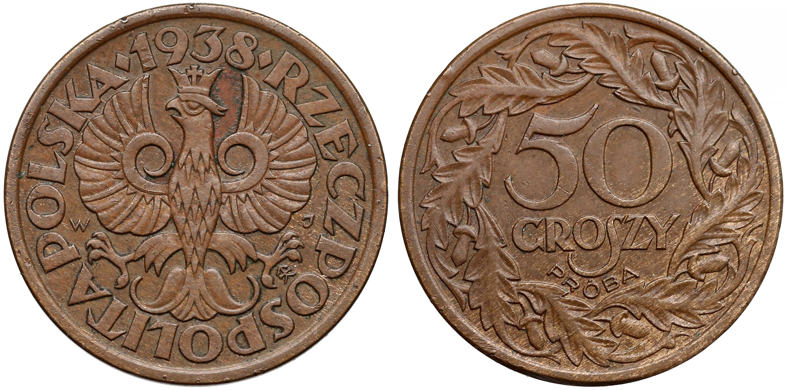 PRÓBA 50 groszy 1938 stary orzeł brąz